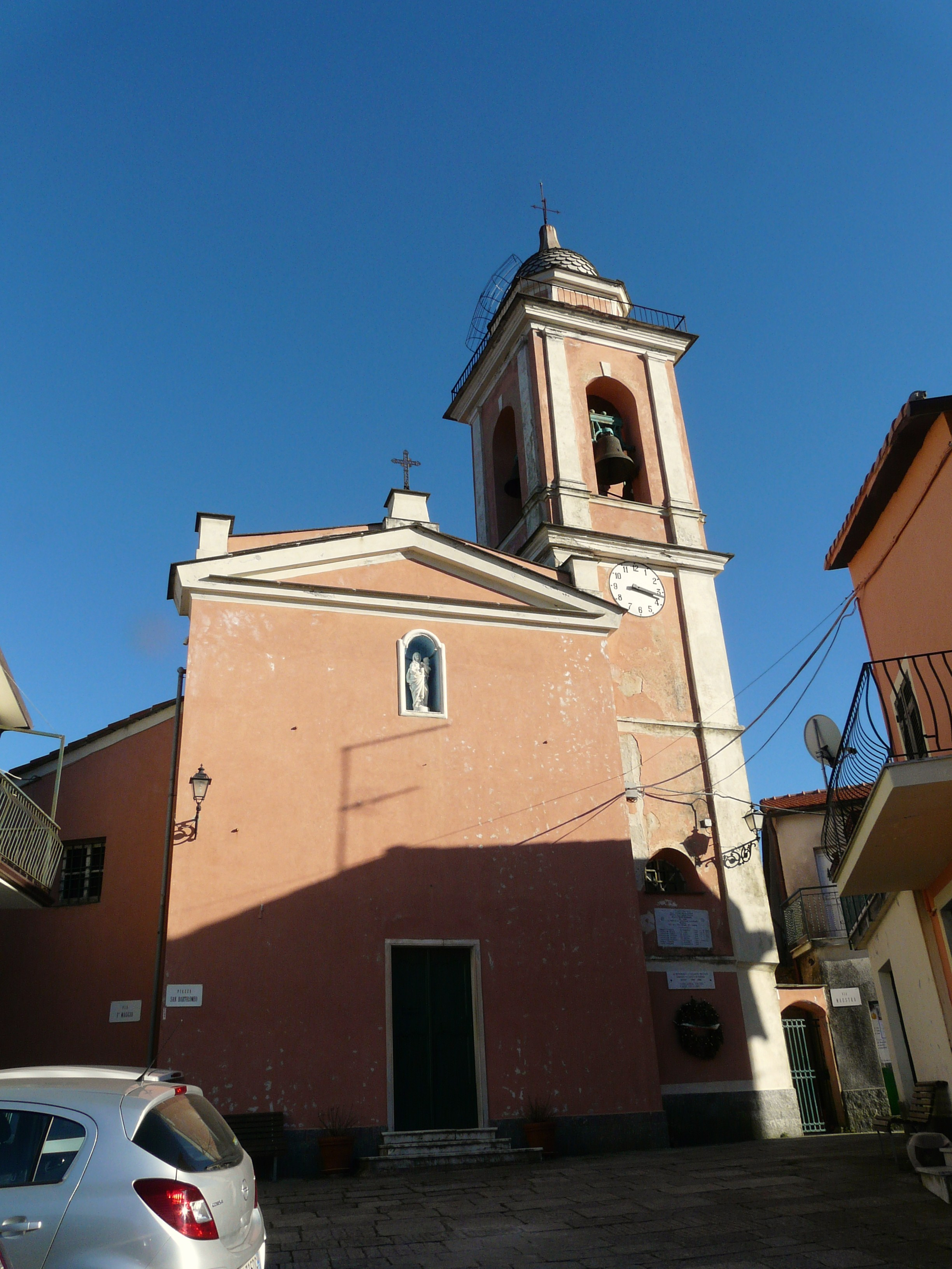 Complesso della chiesa di San Bartolomeo, Carrodano Superiore, Carrodano, Liguria, Italia